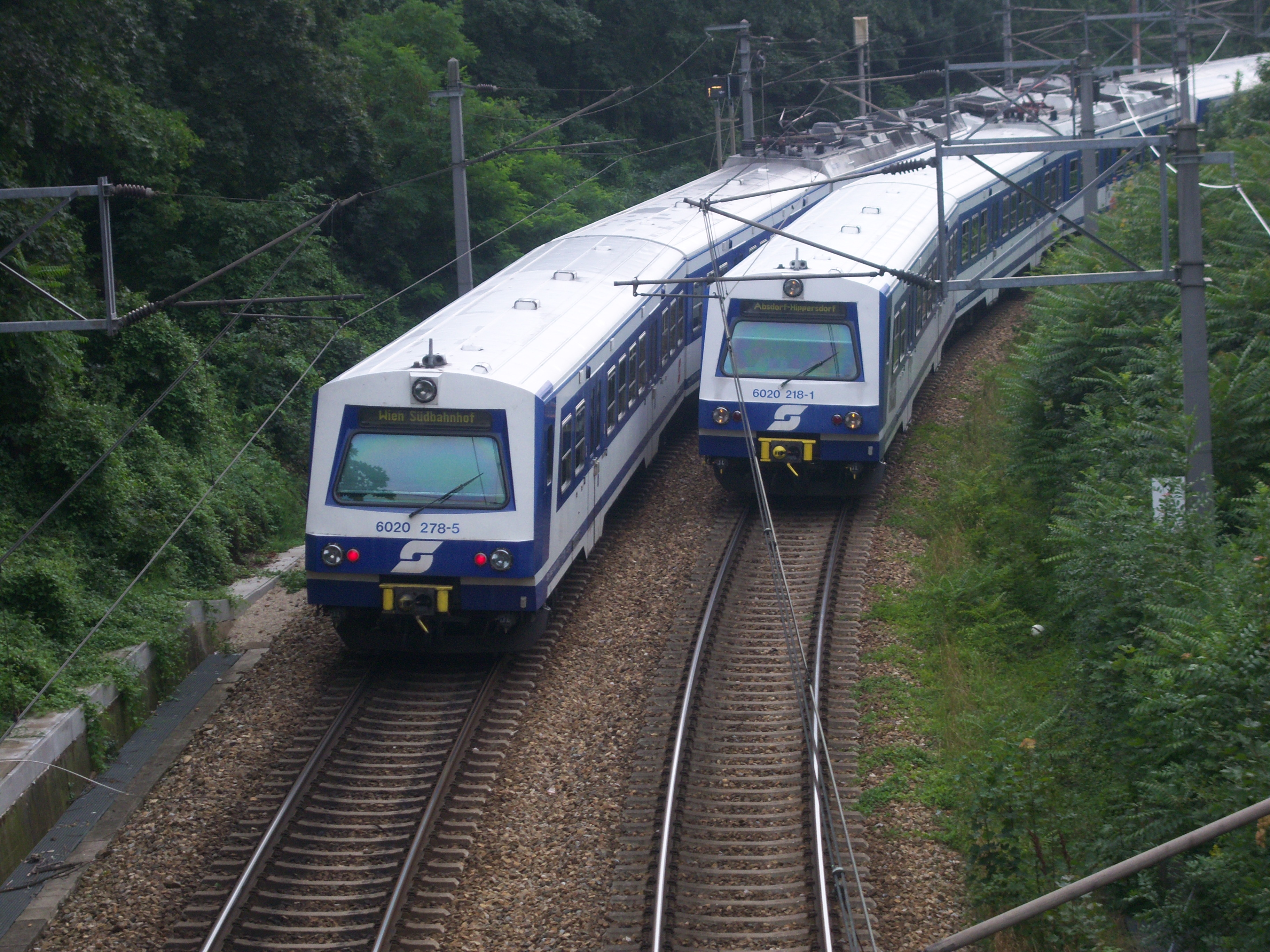 2 S-Bahnen begegnen sich auf der Stammstrecke, nach dem Gürtel, vor dem Südbahnhof